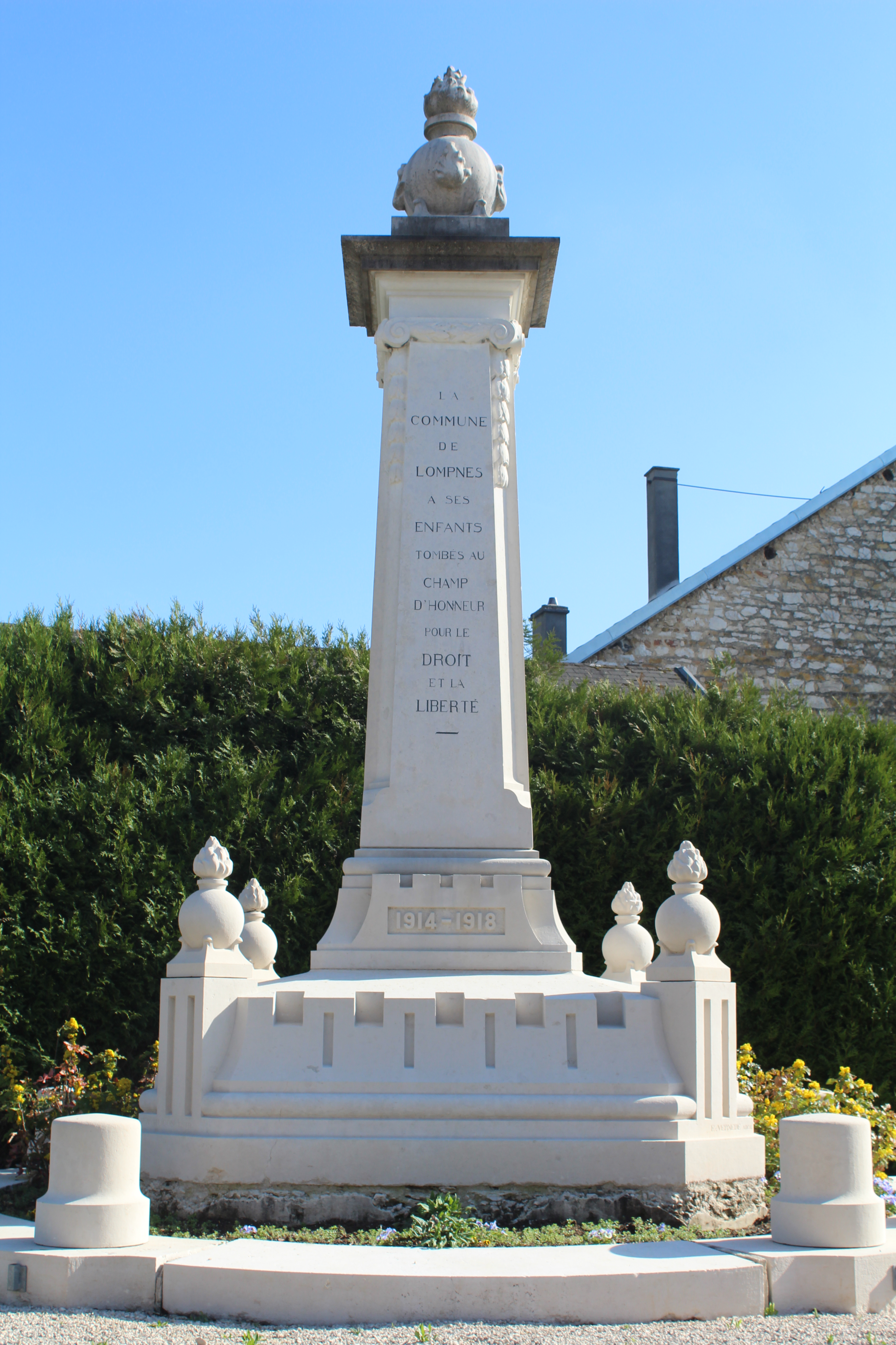 Monument aux morts de Lompnes, Hauteville-Lompnes.